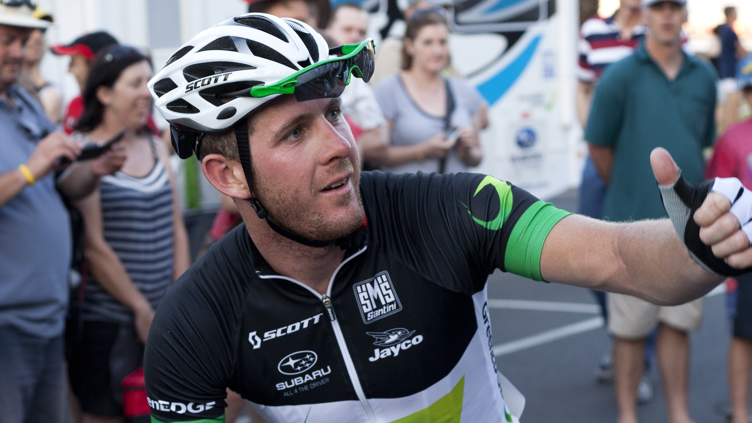 Matthew Goss debutando con el maillot del GreenEdge Cycling Team en la Jayco Bay Cycling Classic 2012